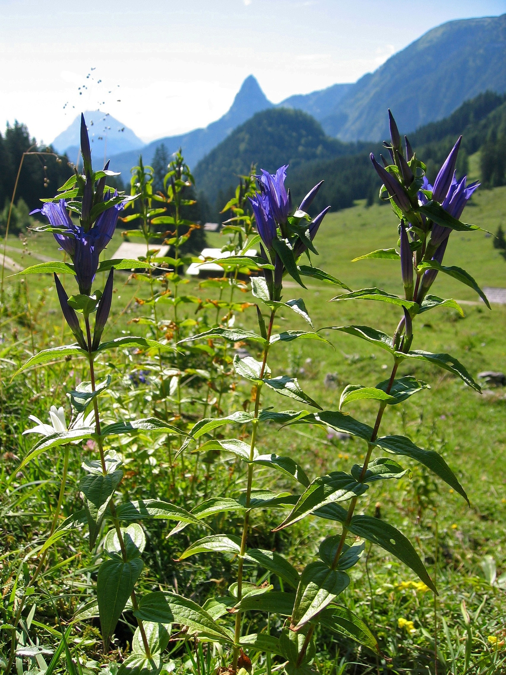 Gentiana asclepiadea, Hintereggeralm, Styria, Austria